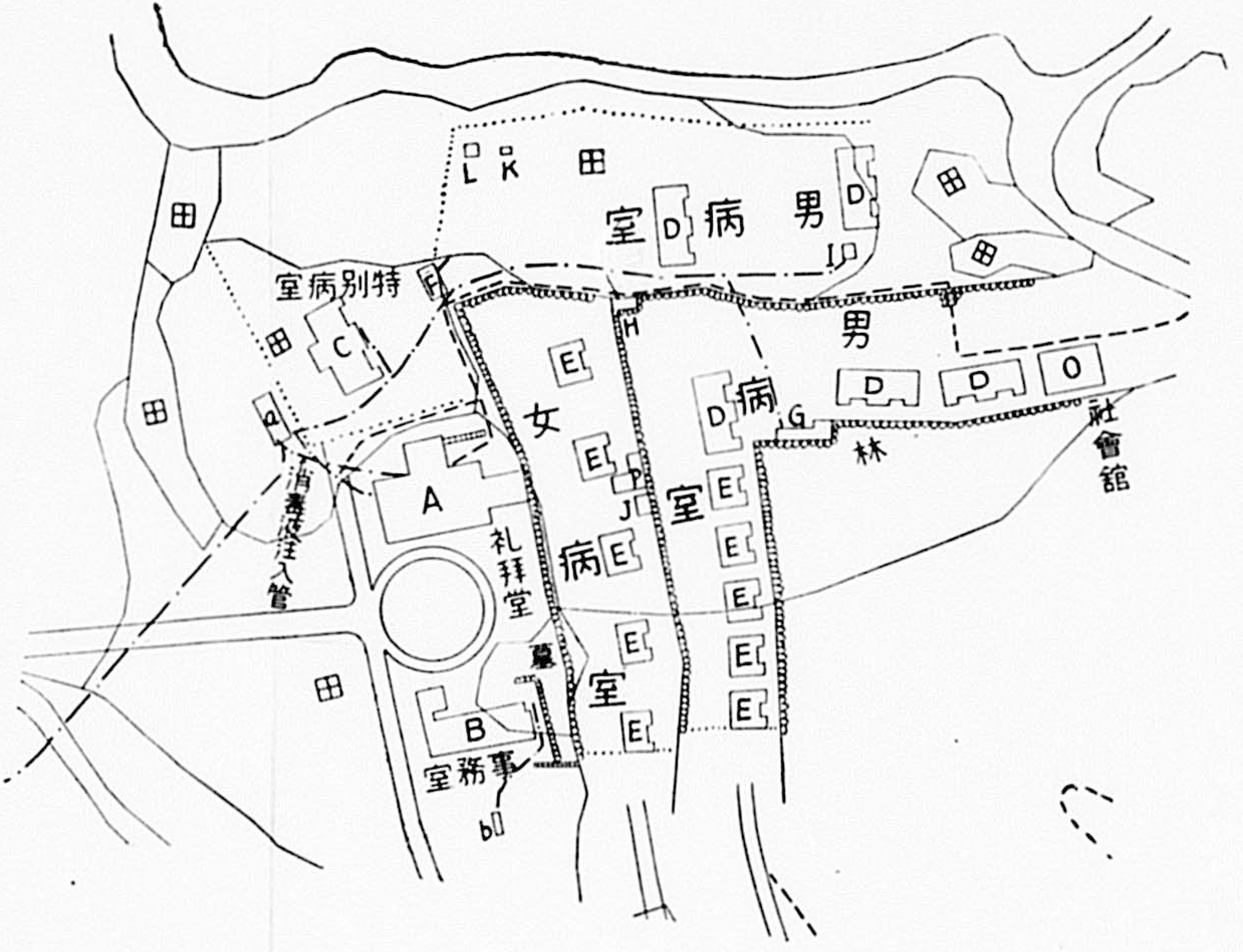 中文（台灣）: 樂山園配置圖